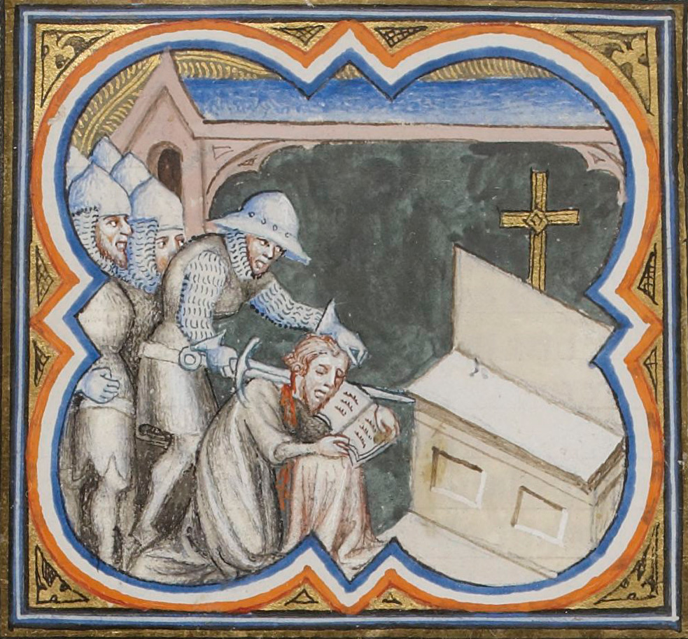 Mort de Charles le bon. Enluminure des Grandes Chroniques de France, XIVe siècle. Paris, BnF, département des Manuscrits, Français 2813, folio 206 verso.